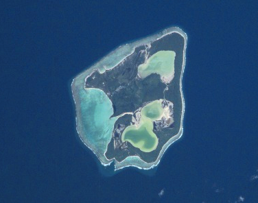 NASA picture